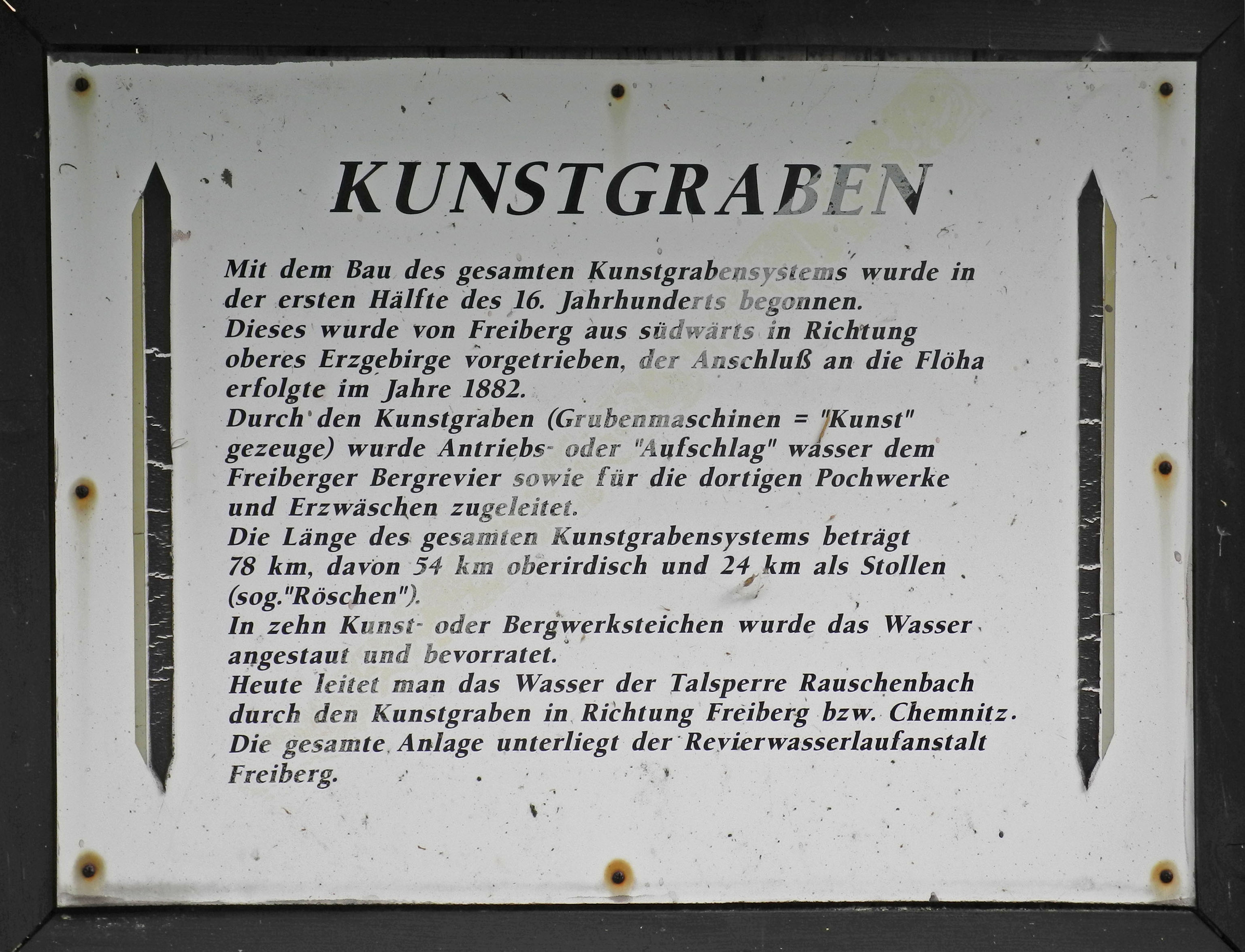 Revierwasserlaufanstalt Freiberg: Erläuterungstafel zur Wasserversorgung durch Kunstgräben im Erzgebirge